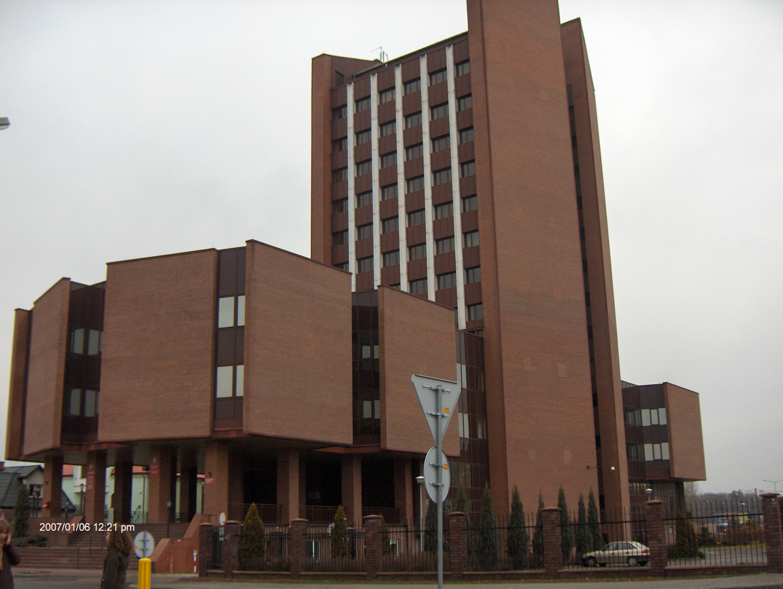 Sąd w Tarnobrzegu